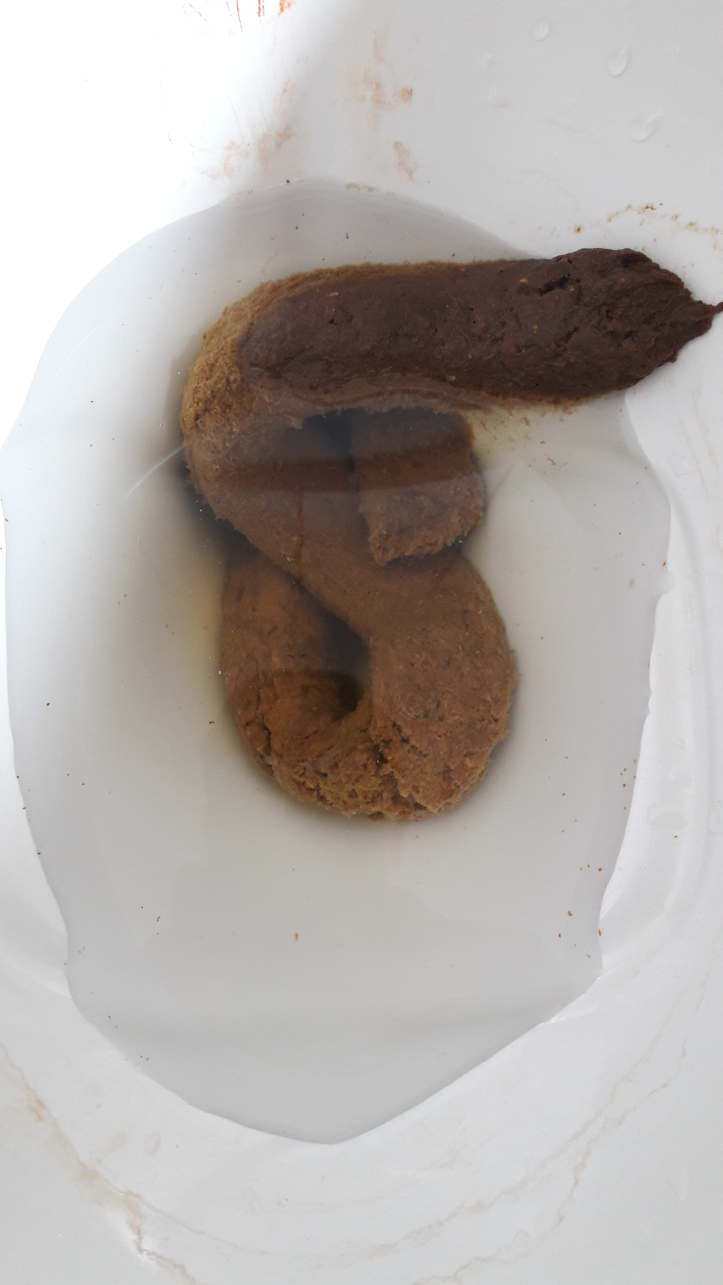 Fezes fescas.